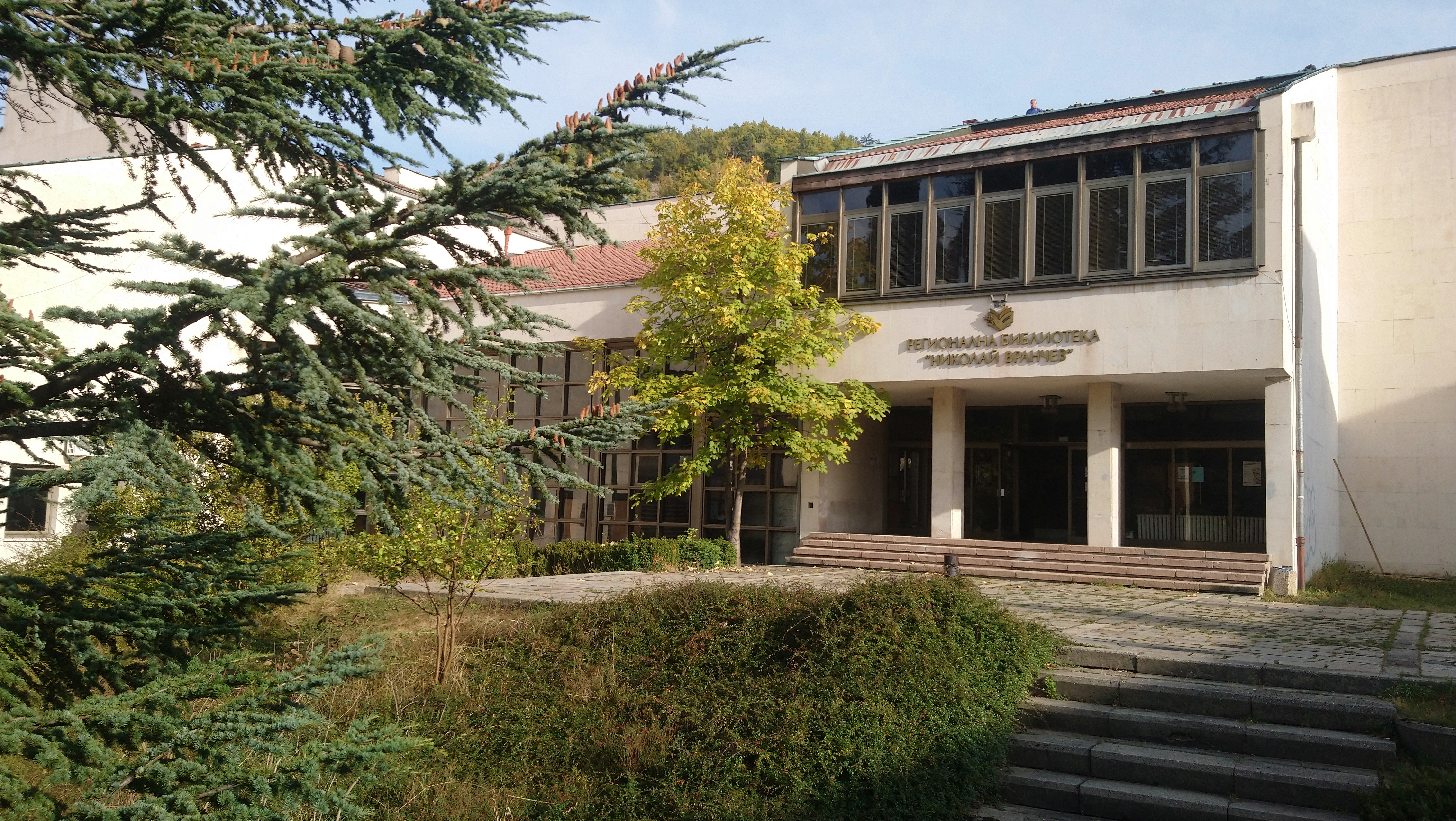 Смолян - Регионална библиотека Николай Вранчев